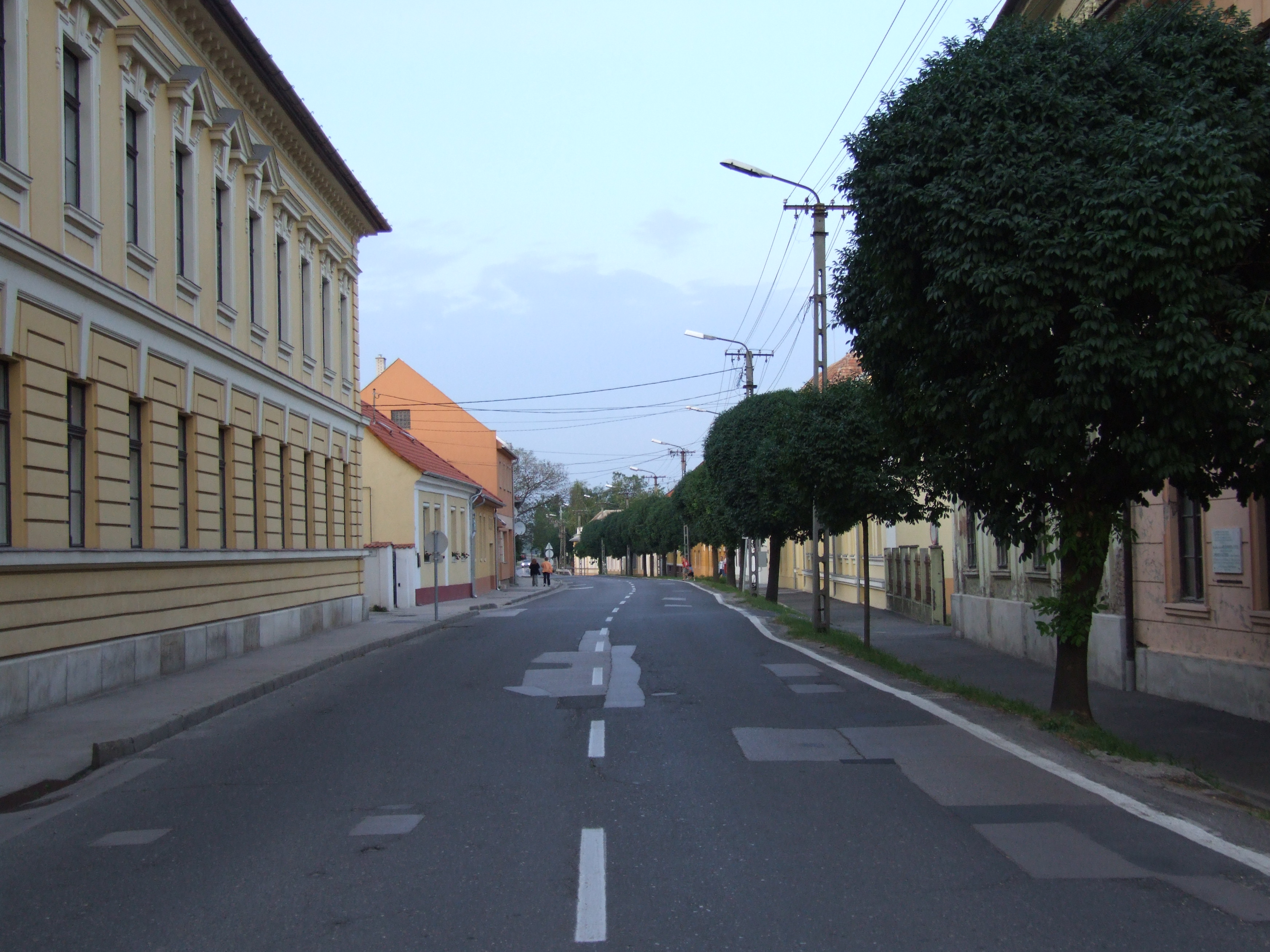 Paks Óváros, a Deák Ferenc utca, 10 felől, kelet,-a város széle,-felé nézve